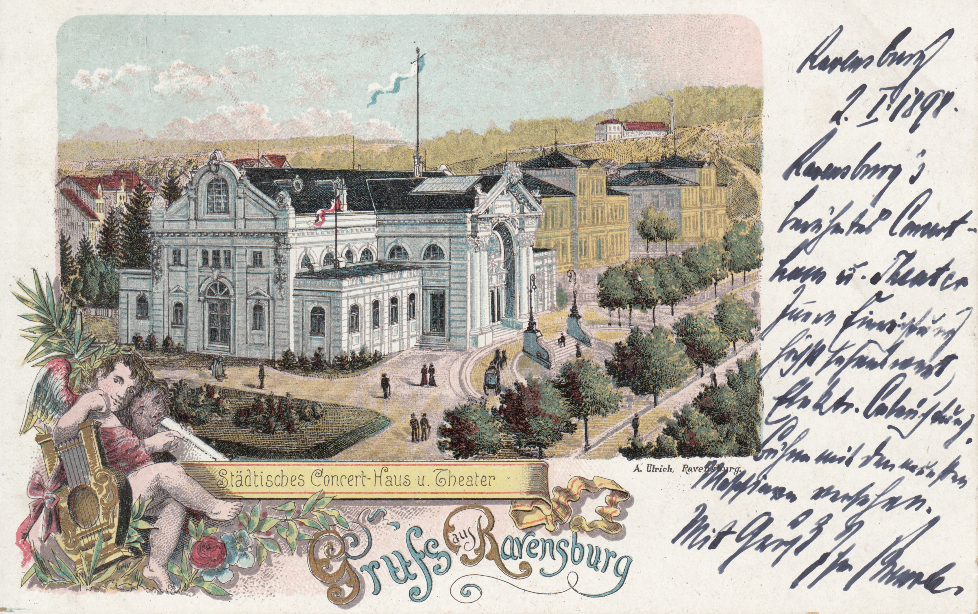 Ravensburg, Konzerthaus, Ansichtskarte, gesendet 1899; "Gruss aus Ravensburg - Städtisches Concert-Haus u. Theater"